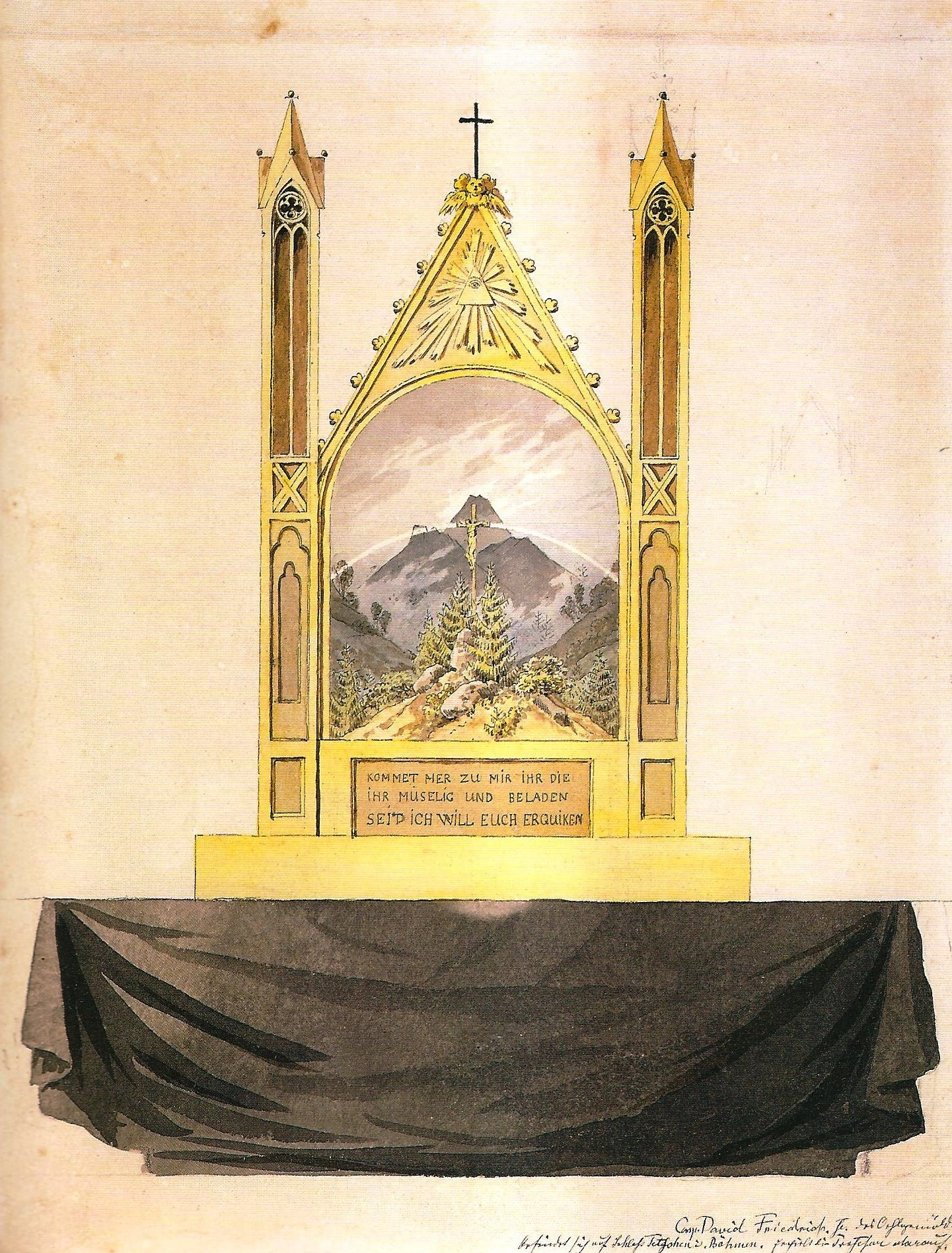 Kreuz vor Regenbogen im Gebirge, um 1817, Feder, Aquarell, 27,2 x 20,8 cm